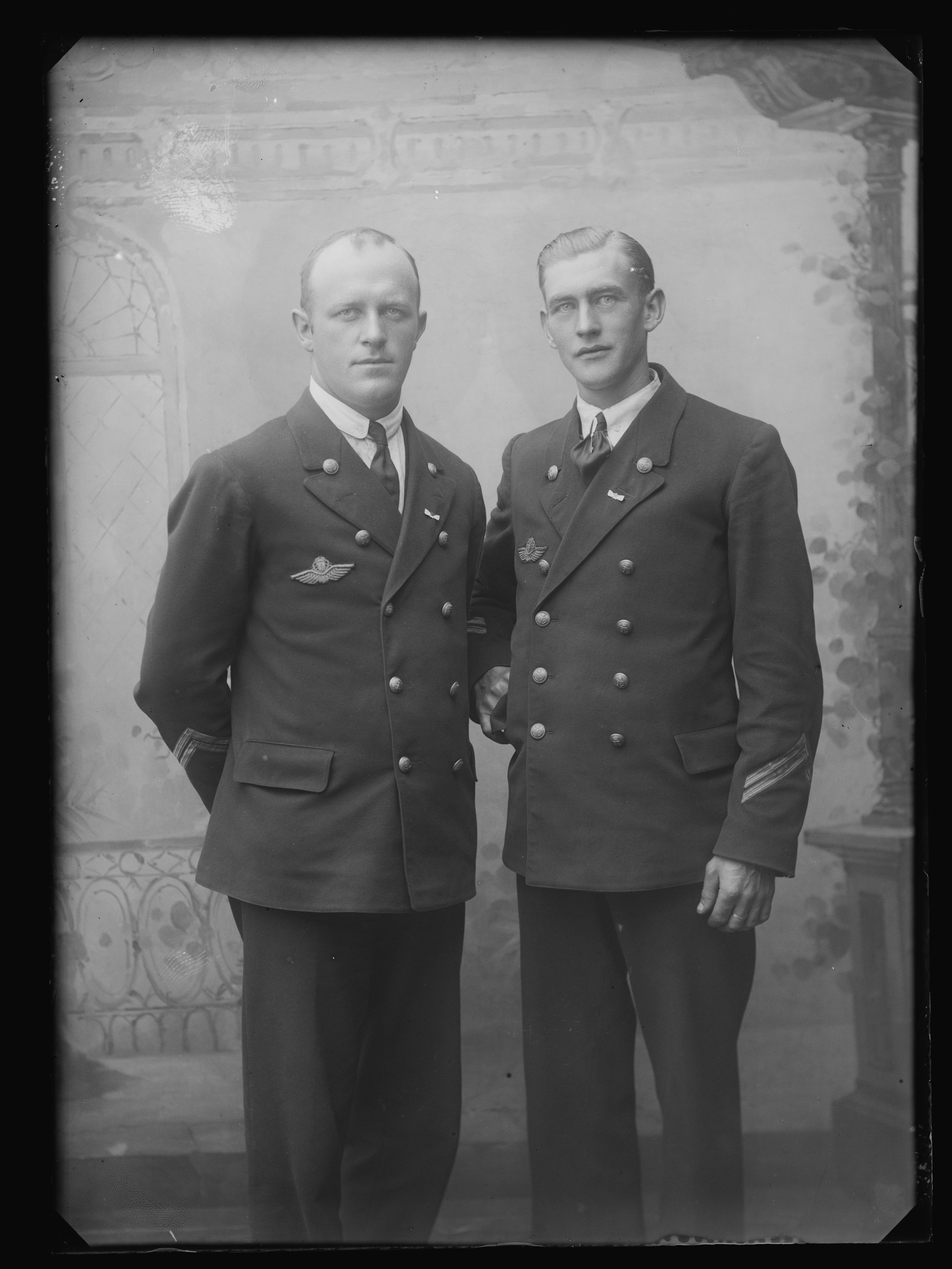 Bildet er hentet fra Nasjonalbibliotekets bildesamling. Til høyre: Oskar Omdal. Depicted person: Oskar Omdal